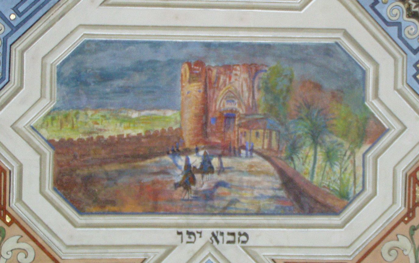 Sceny biblijne na stropie synagogi Kupa w Krakowie